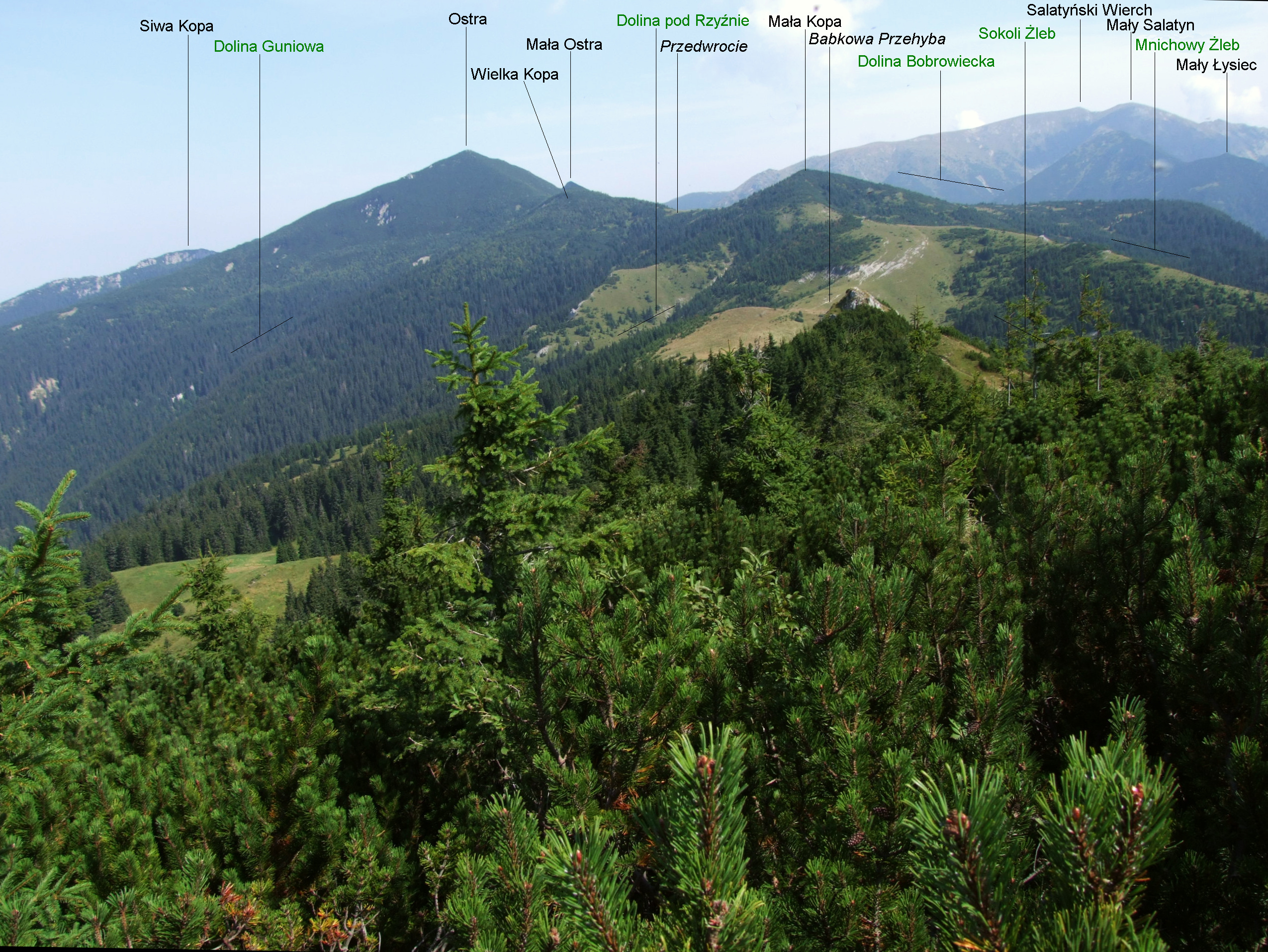 Widok z Babek